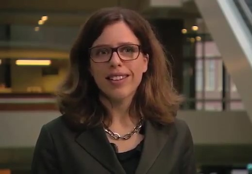 Carola Schouten, Tweede Kamerlid ChristenUnie